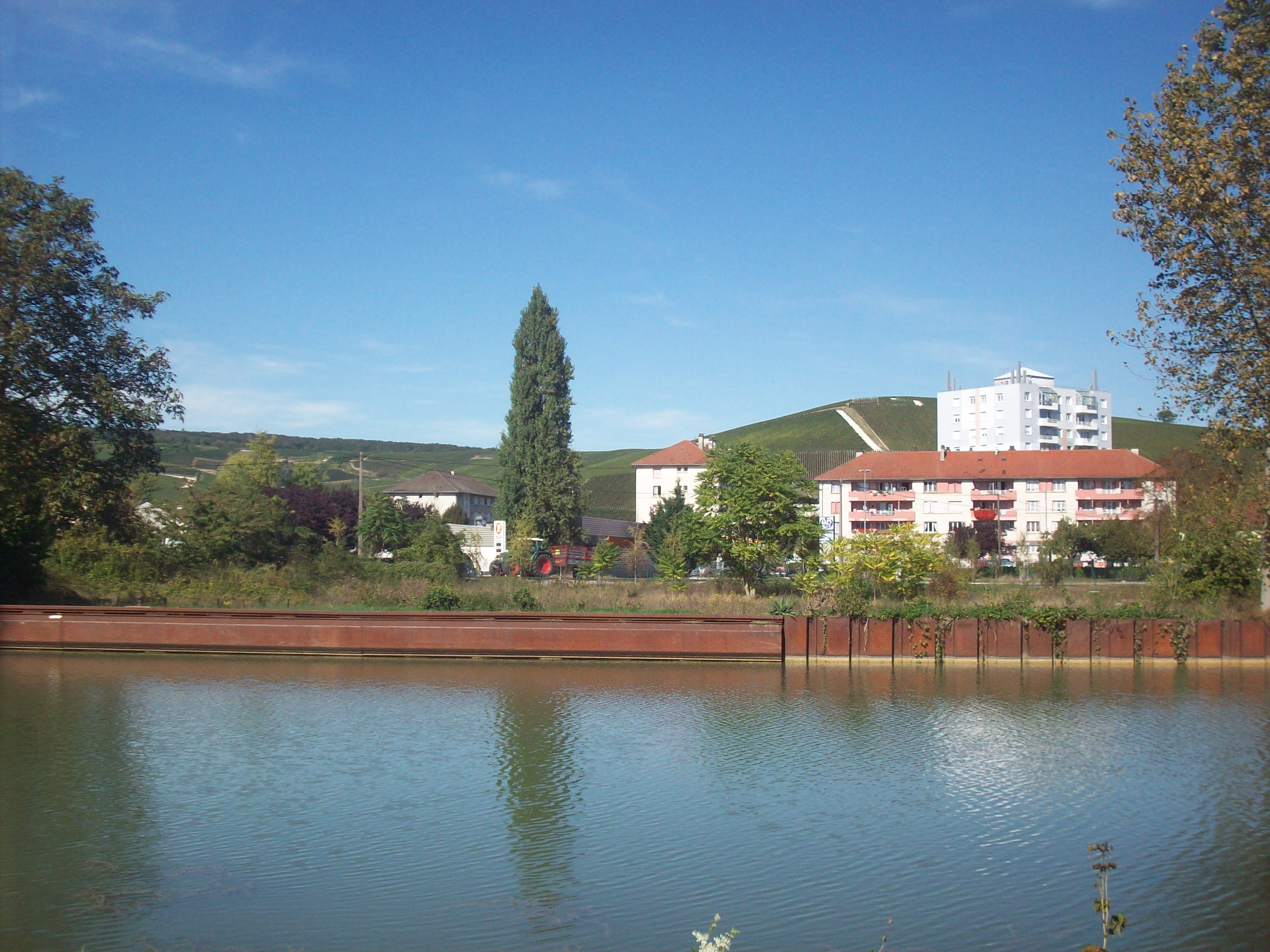 Immeubles du quartier de la Noue, à Aÿ, vus depuis le canal latéral à la Marne.